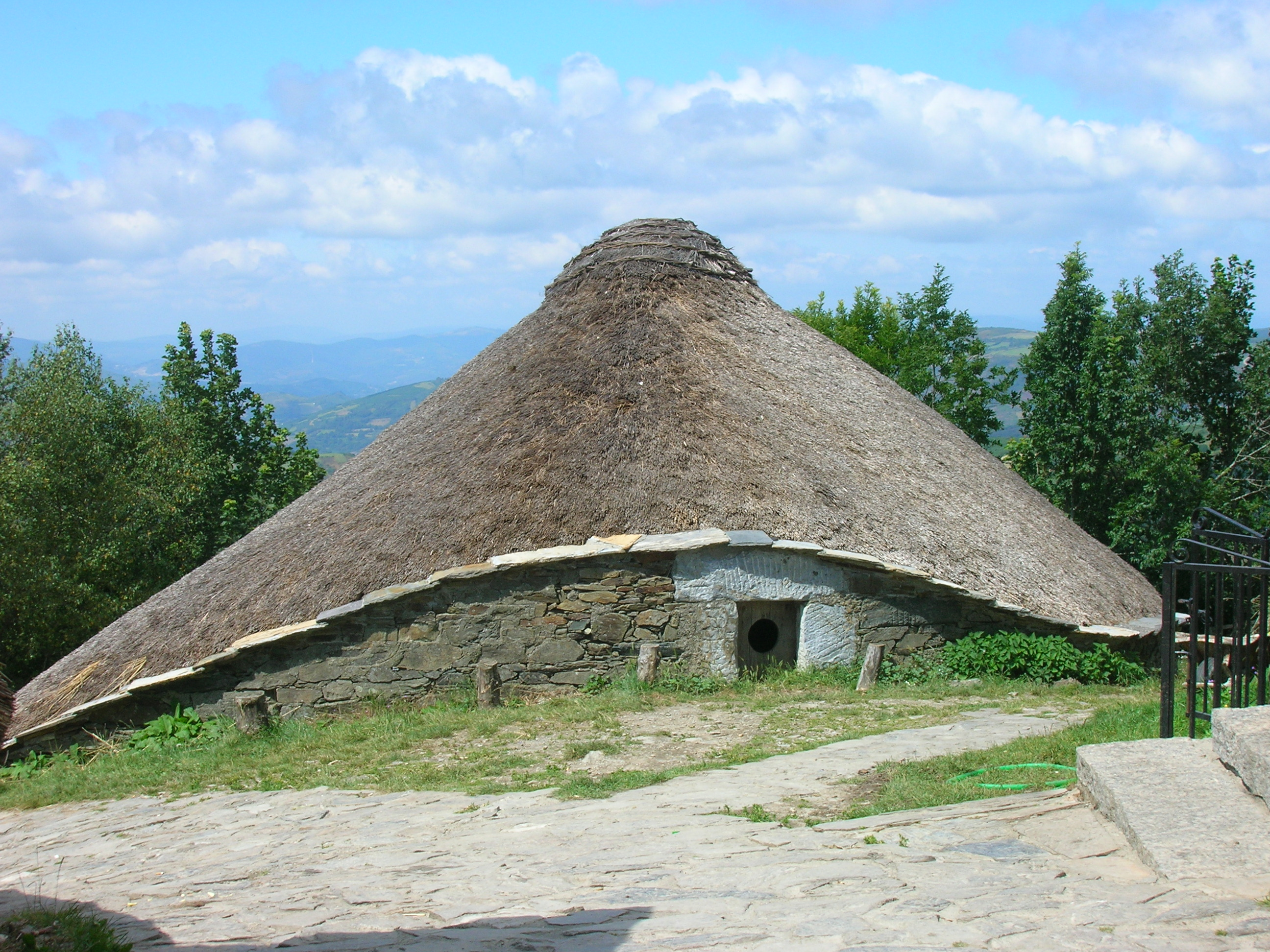 Palloza en O Cebreiro, concello de Pedrafita do Cebreiro (Lugo, Galiza). El parque etnográfico de O Cebreiro, primera etapa en suelo gallego del Camino de Santiago, cuenta con varios ejemplos restaurados de la tradicional palloza, edificaciones característica de la cultura prerromana que todavía se conserva en otros numerosos puntos de la región natural de Os Ancares. Más información en [1]